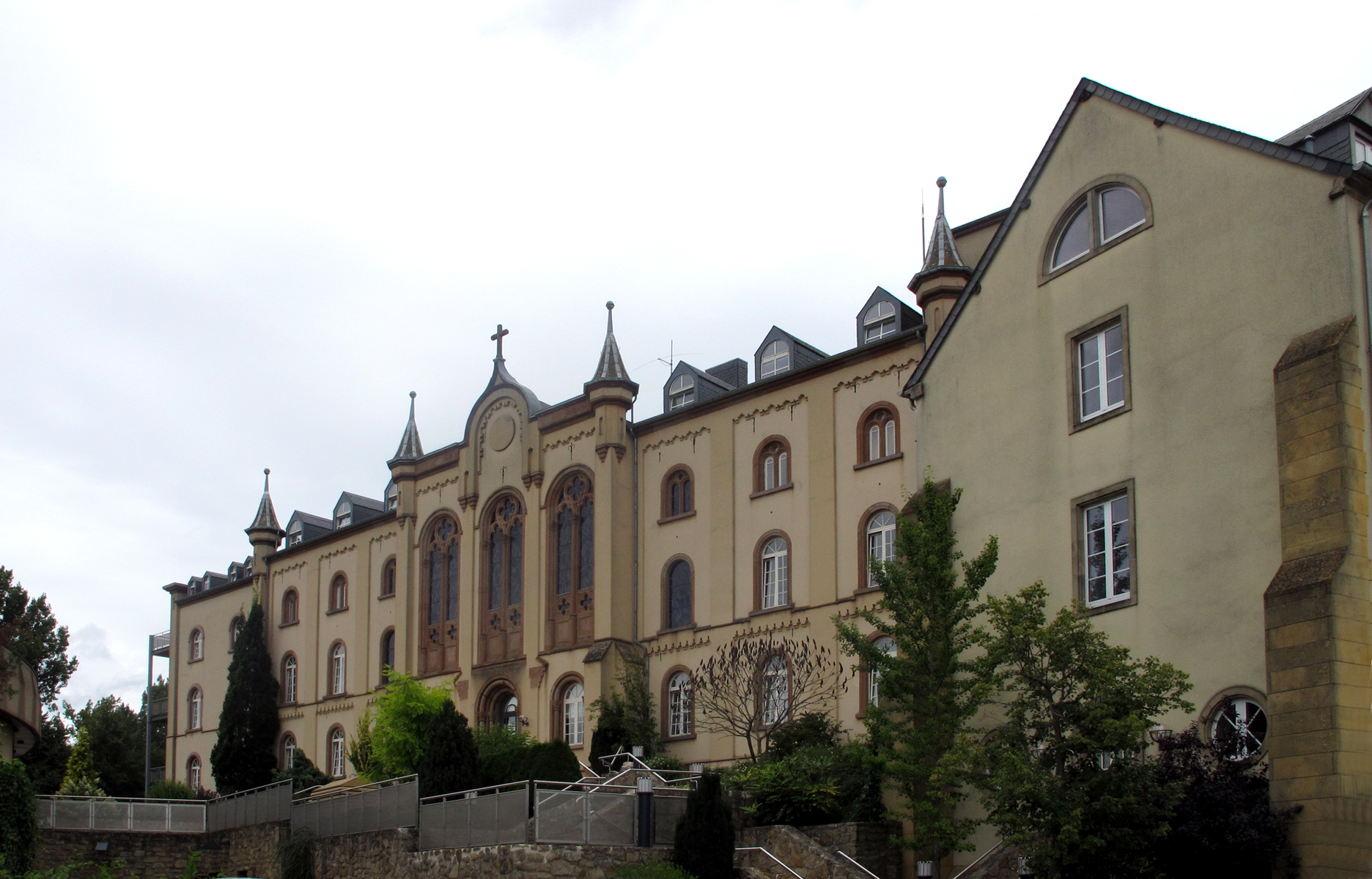 Altersheim in Bettembourg, rue de la Tannerie. Ehem. Kloster.